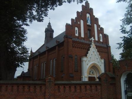 Kościół parafialny p.w. Niepokalanego Poczęcia NMP w Ceranowie (zabytek nr rejestr. A-305)